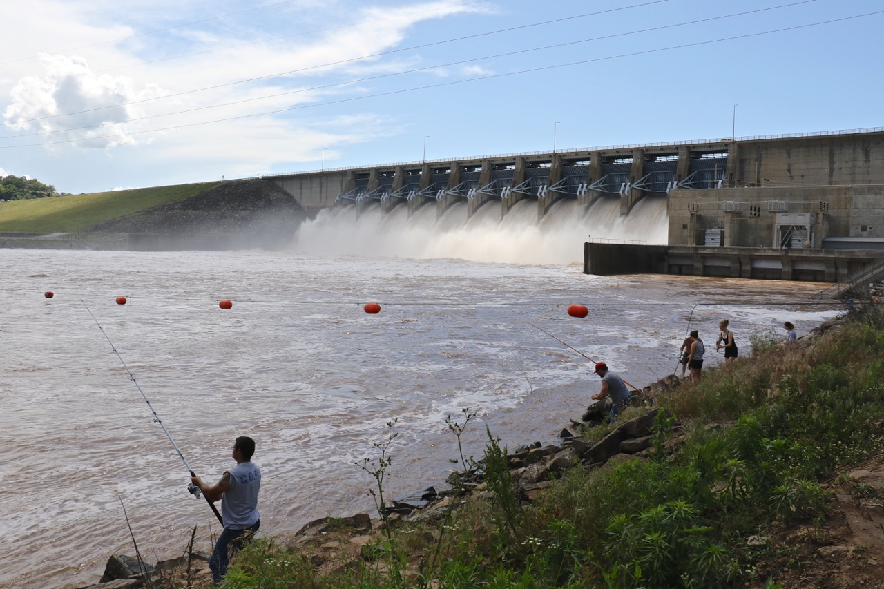 Eufaula Dam.